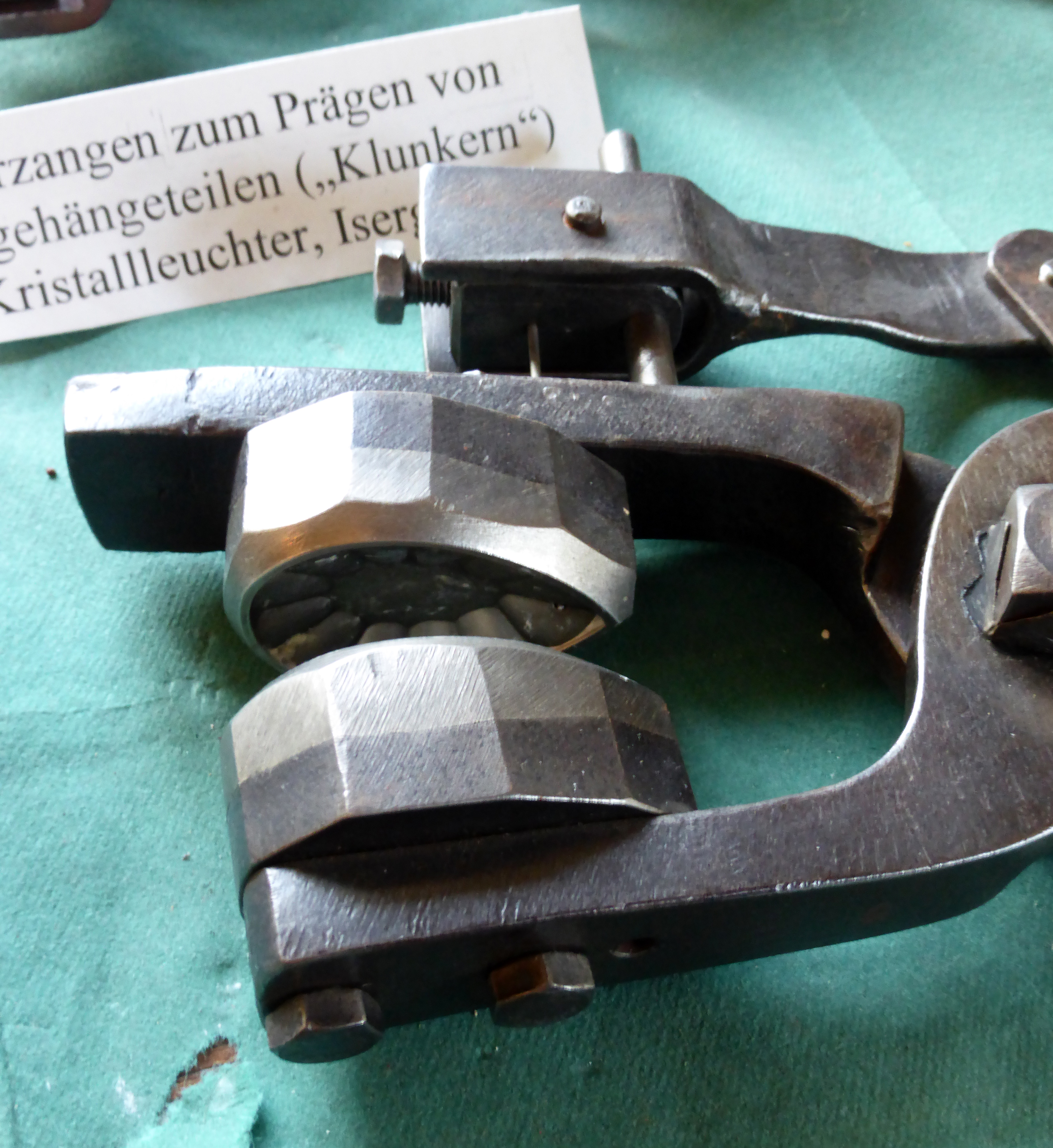 Lüsterzange (Pressglas) im Glashüttenmuseum des Erzgebirges in Neuhausen/Erzgebirge - Landkreis Mittelsachsen.